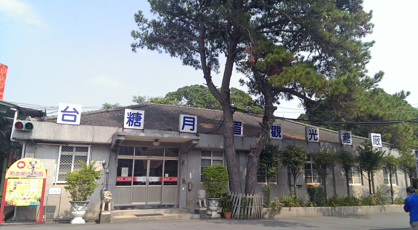 中文（台灣）: 月眉糖廠辦公室